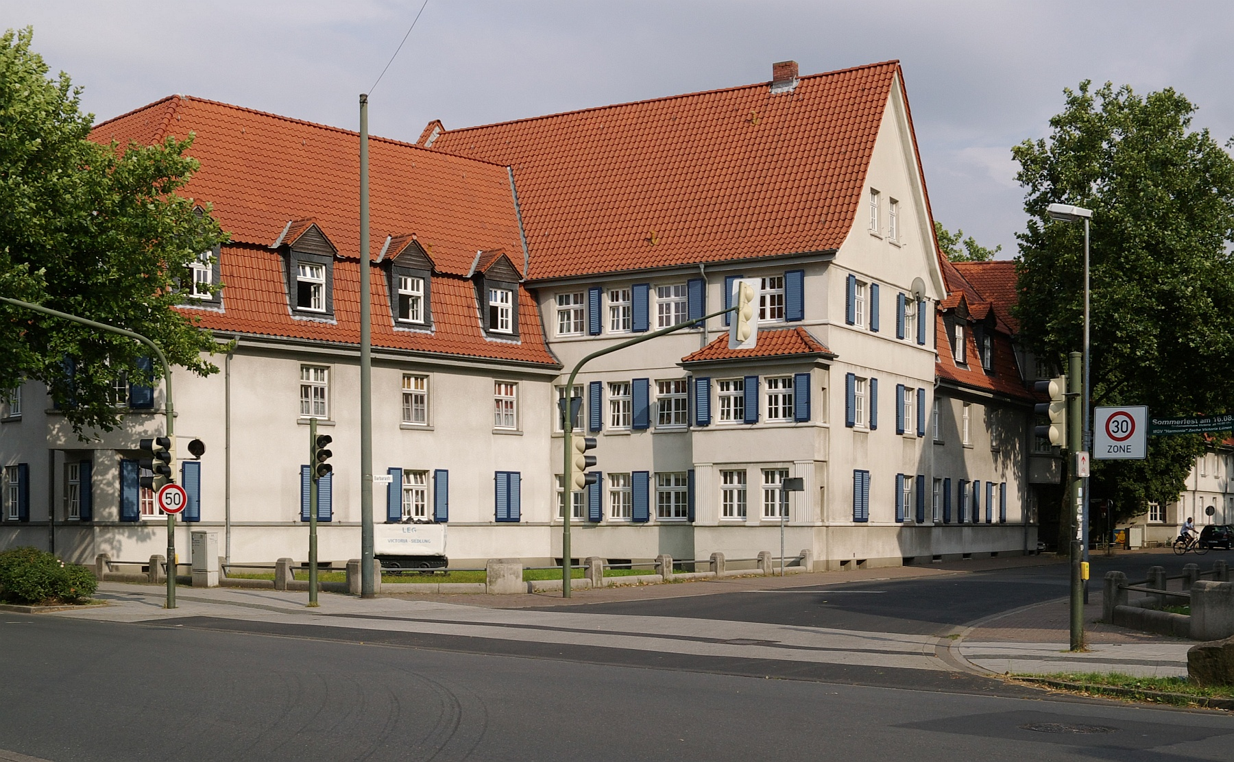 Viktoriasiedlung in Lünen, Nordrhein-Westfalen. Arbeitersiedlung der Zeche Viktoria, Teil der Route der Industriekultur